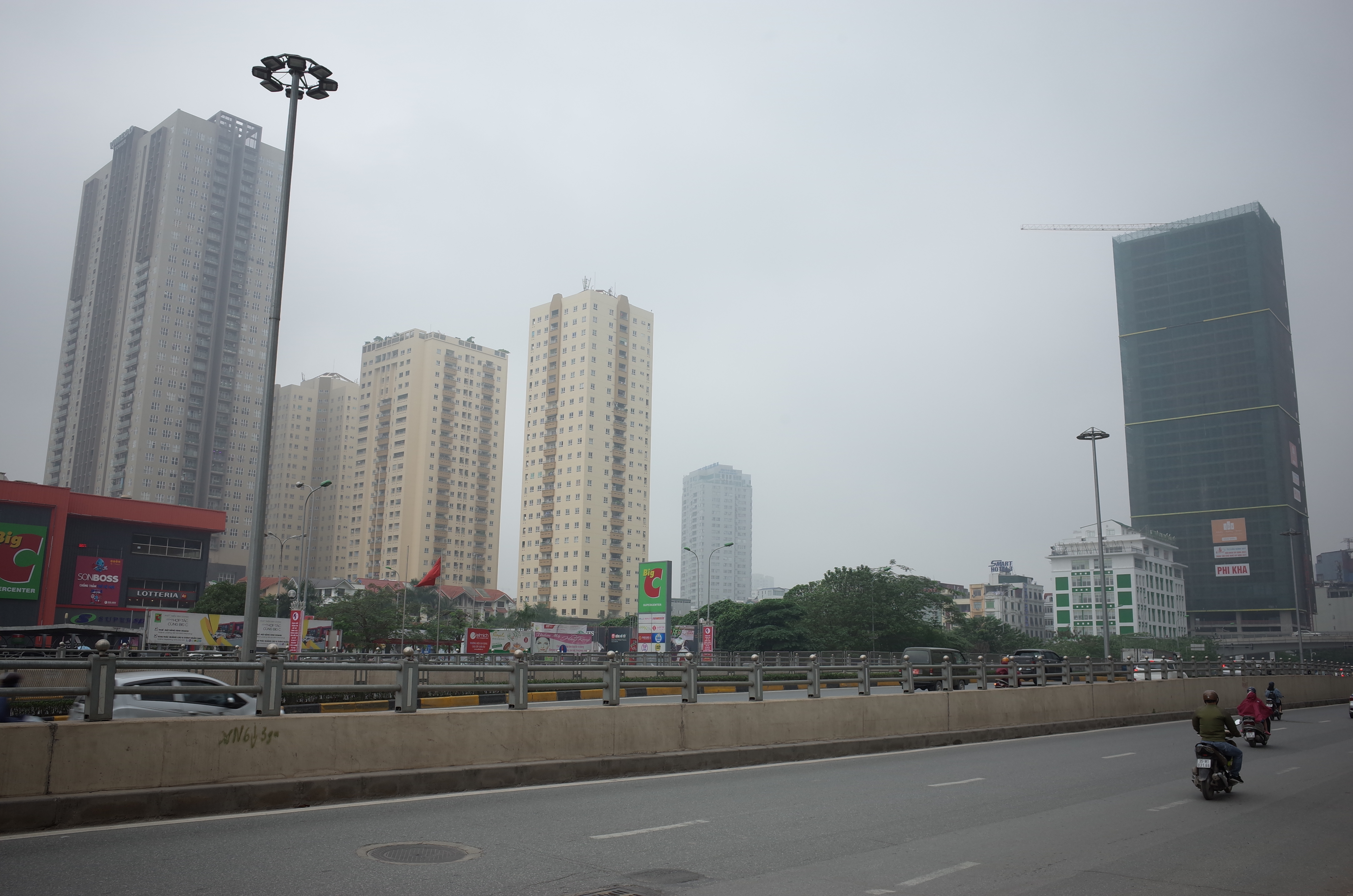 Các tòa nhà cao tầng gần Trung tâm thương mại Big C Thăng Long, đường Trần Duy Hưng, gần ngã tư đường Khuất Duy Tiến giao với đường Trần Duy Hưng, quận Cầu Giấy, thành phố Hà Nội